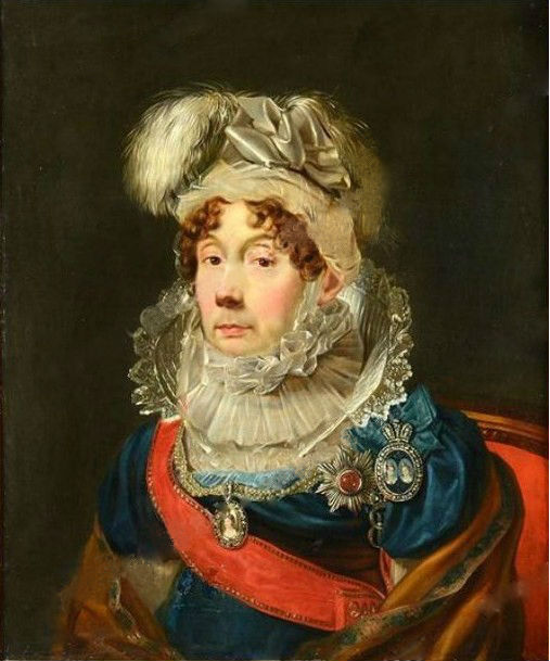 Княгиня Анна Михайловна Прозоровская, урожденная Волконская.